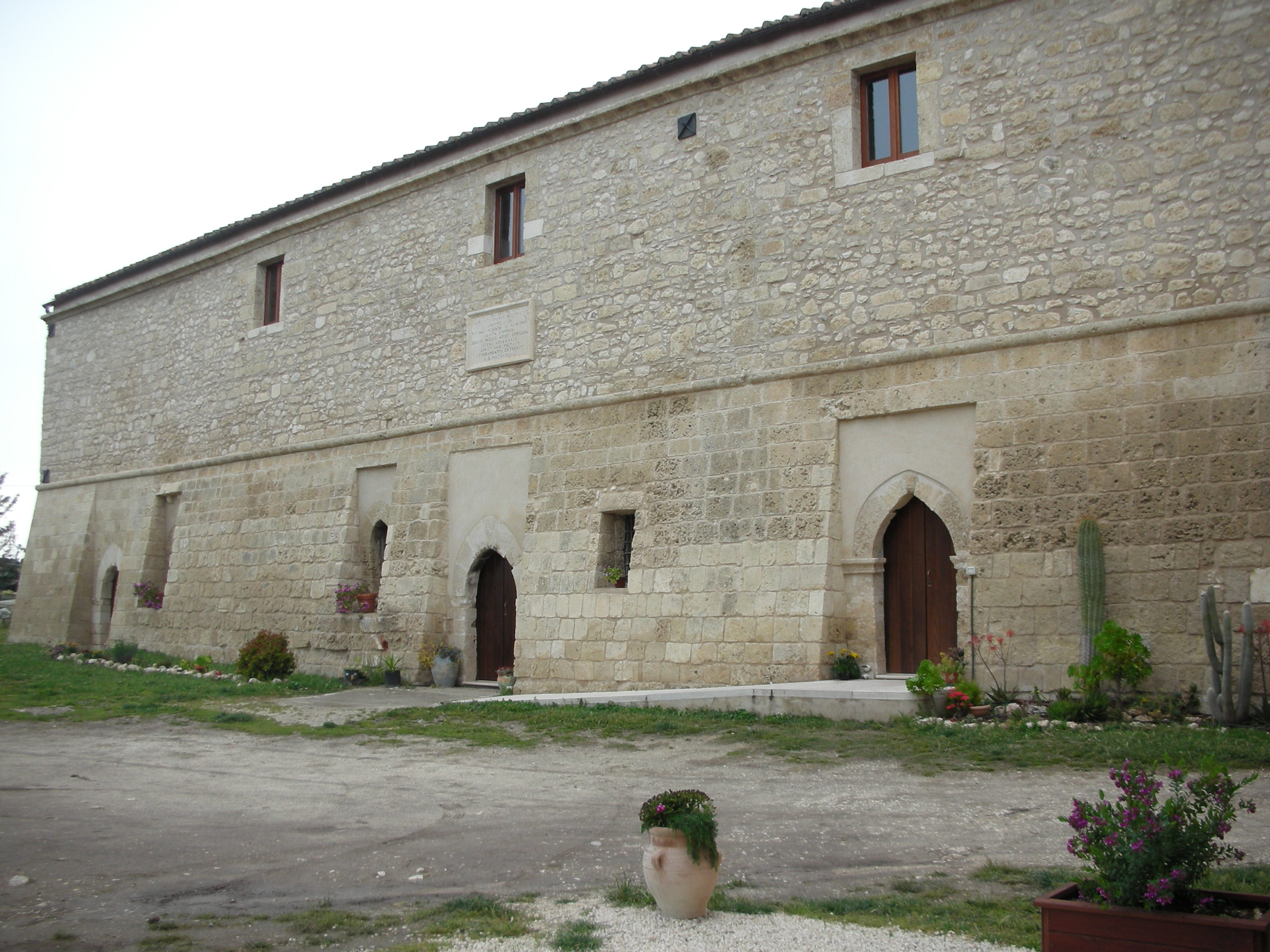 Bâtiments conventuels de l'abbaye San Leonardo de Siponto (Pouilles), côté sud